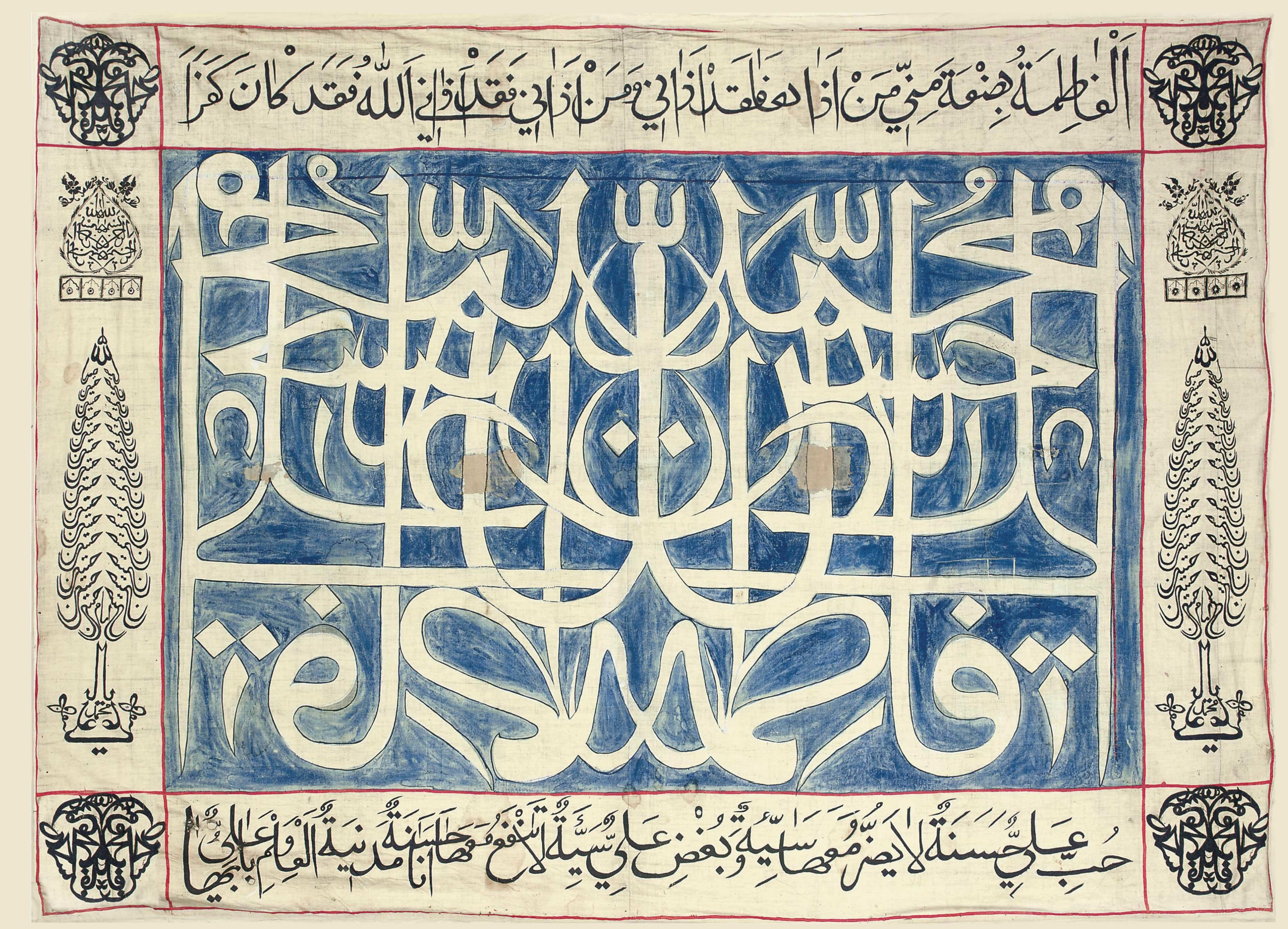 پنج‌تن علیهم‌السلام، ساخته‌شده از روی نسخهٔ اصلی موجود در موزهٔ آقاخان مشخصات نسخهٔ اصلی: خط‌نقاشی روی پارچه احتمالاً ایران یا آسیای مرکزی سدهٔ ۱۳ ه‍.ش